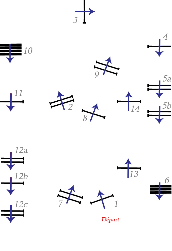 Parcours du saut d'obstacles durant l'Équitation aux Jeux olympiques d'été de 1956.